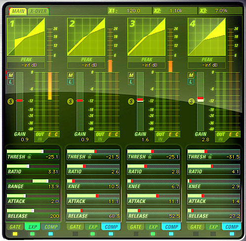 Compresseur multi bande